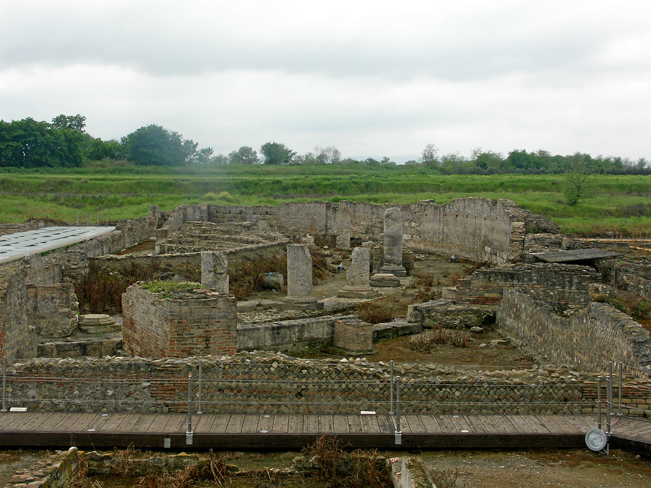 Sibari: Theater